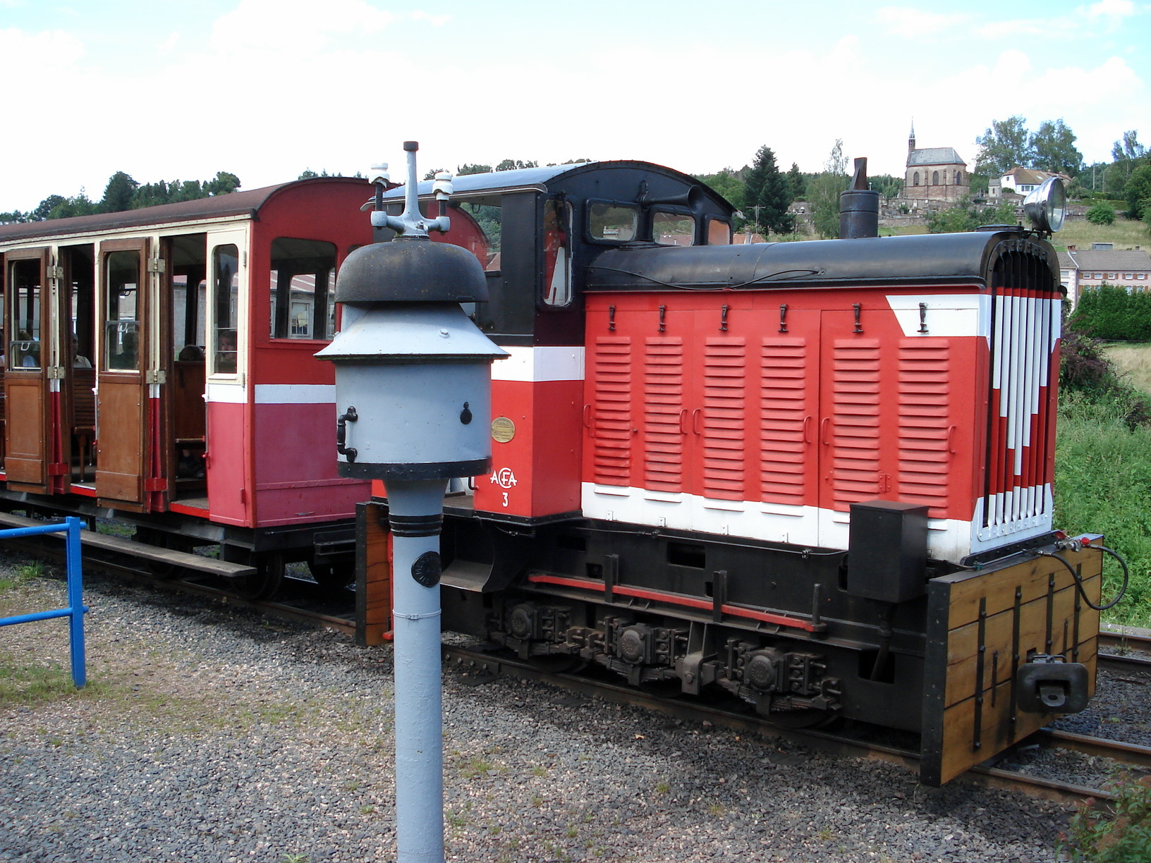 Abreschviller, comm. du dép. de la Moselle, France (région Lorraine). Train touristique (ancien chemin de fer forestier) : locotracteur diésel Coferna de 1953. À l'arrière-plan à droite : chapelle néogothique Sainte-Marguerite (achevée 1881) au milieu du cimetière d'Abreschviller.